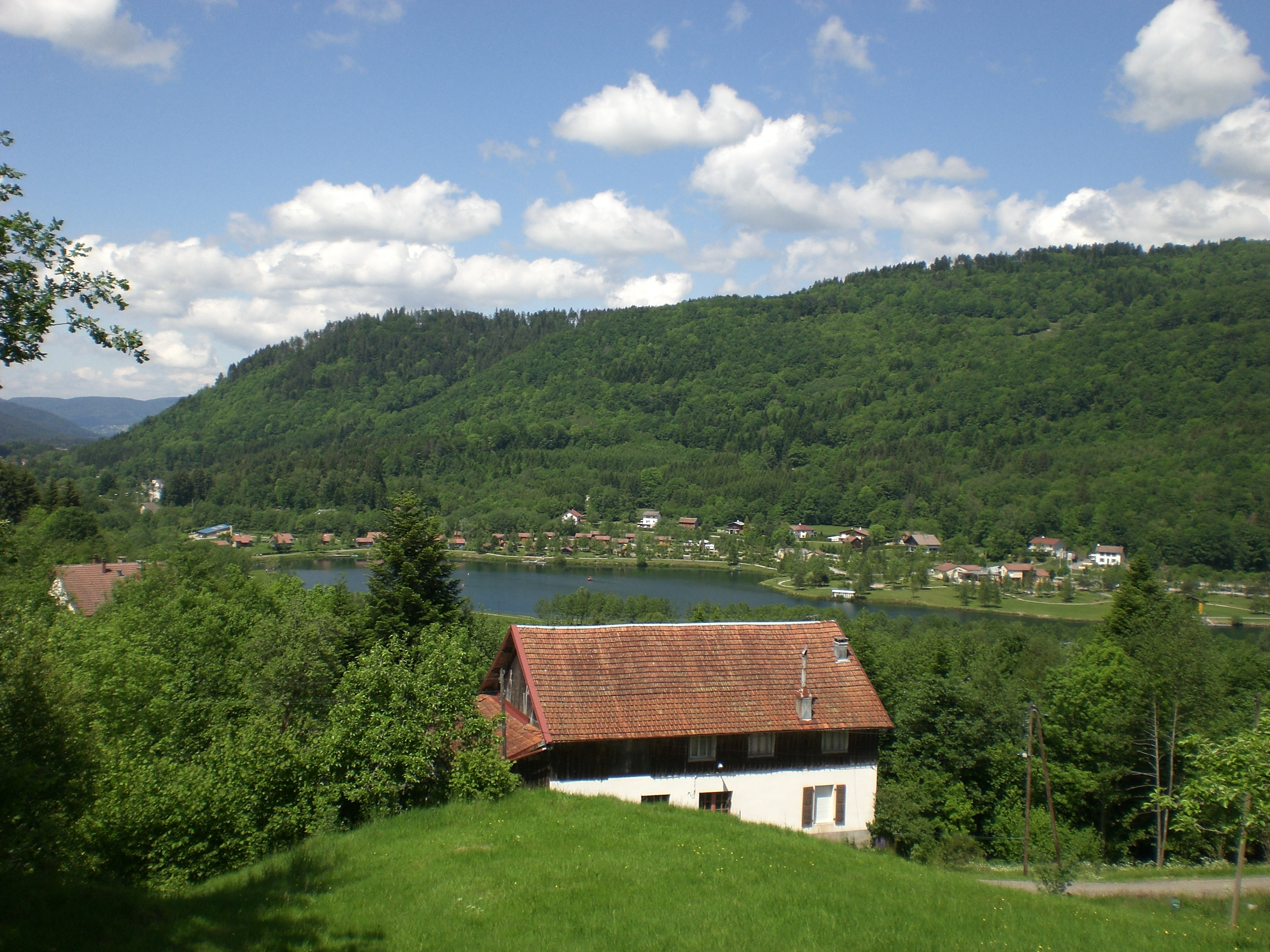 France, Vosges, Saulxures-sur-Moselotte Vue panoramique du lac artificiel et de la base de loisir depuis le versant les Amias.